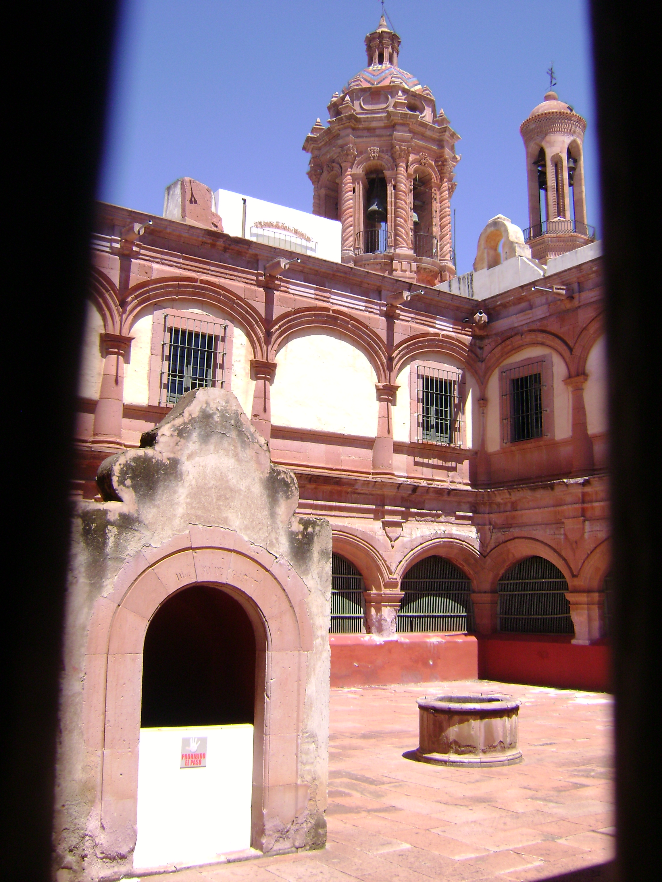 Patio del Museo de guadalupe, ex Colegio de Propaganda Fide